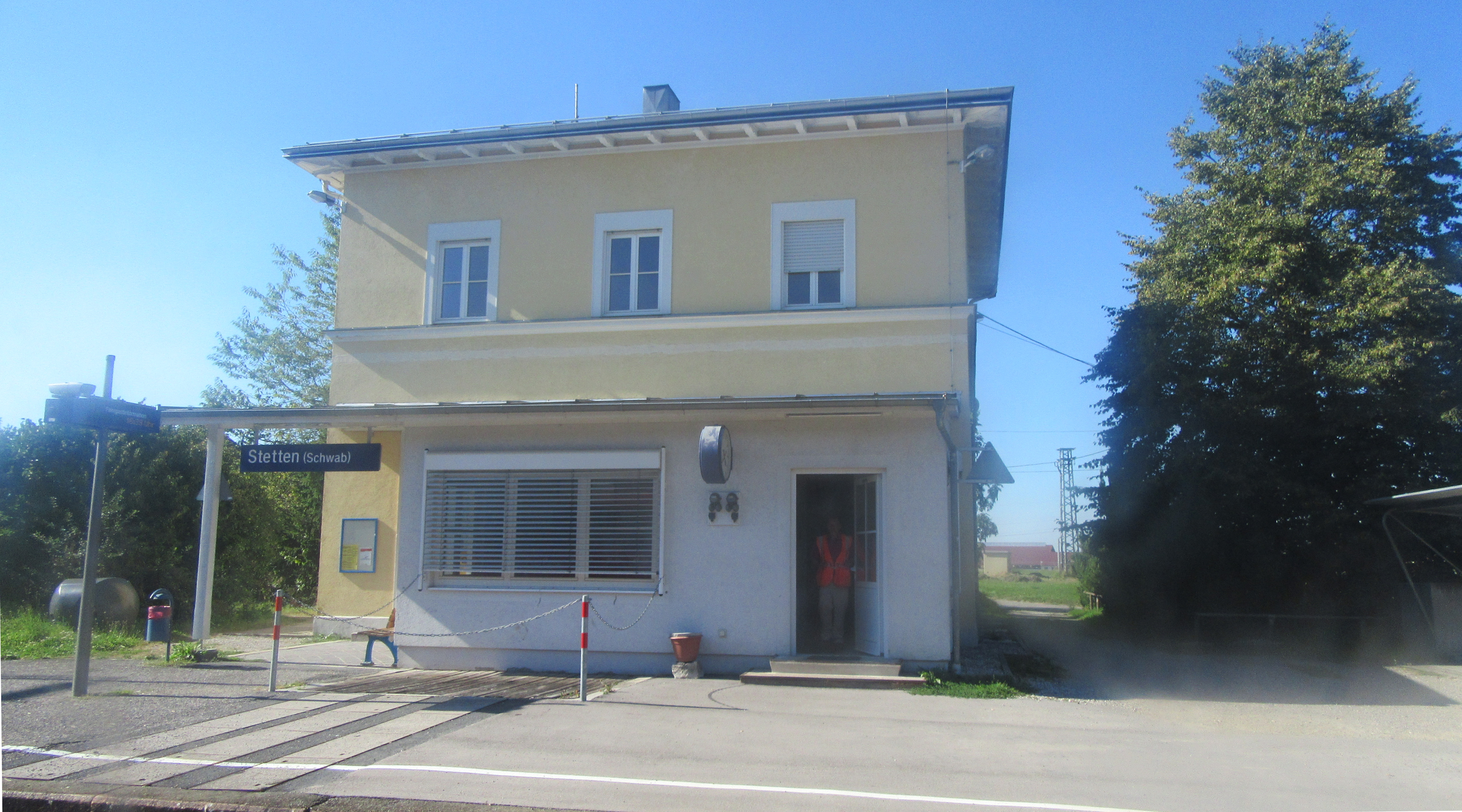 Das Empfangsgebäude des Bahnhofs Stetten (Schwab) von der Gleisseite.